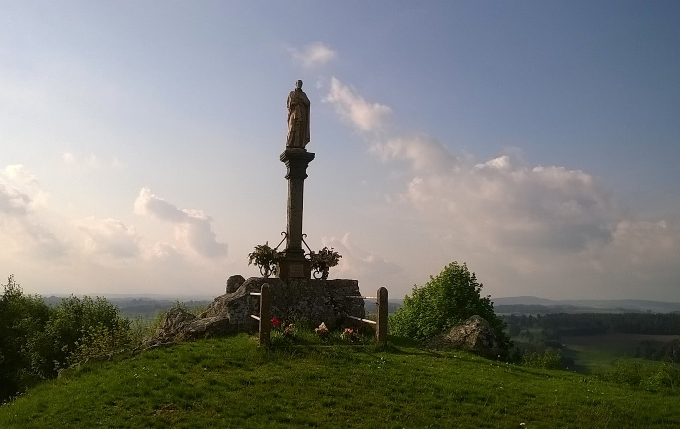 montregard9